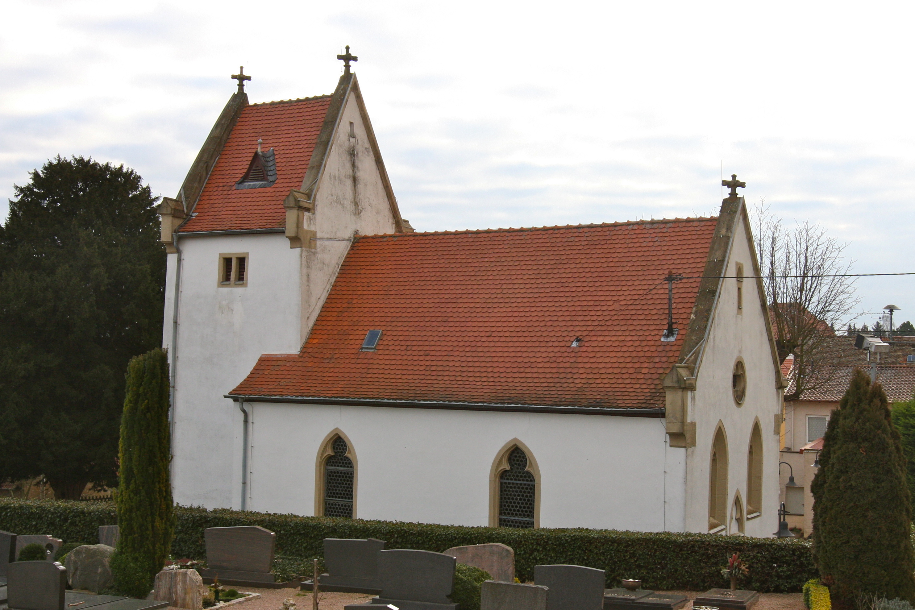 Taufkirche der Heiligen Hildegard von Bingen in Bermersheim vor der Höhe